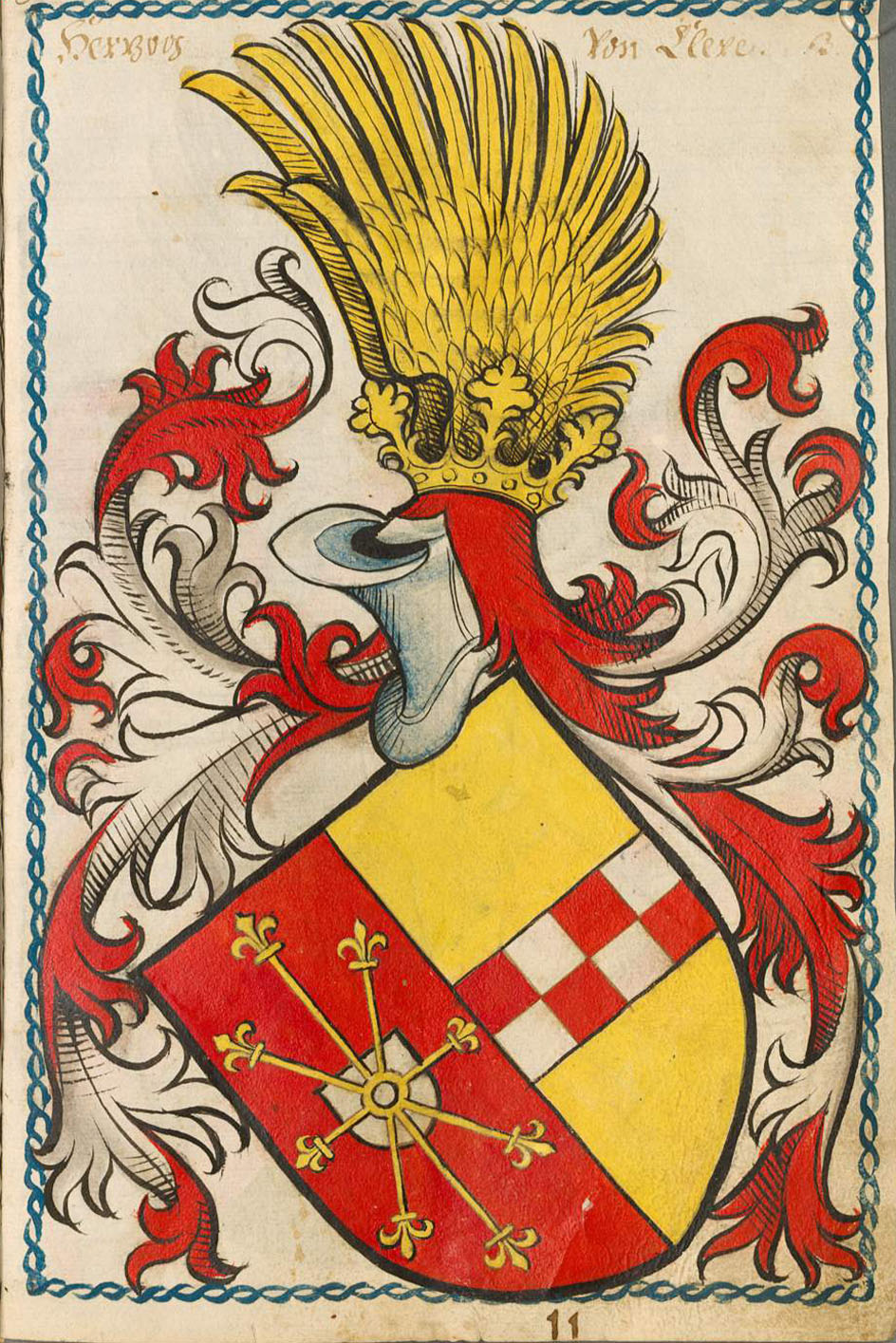 Scheibler'sches Wappenbuch , älterer Teil Cleve